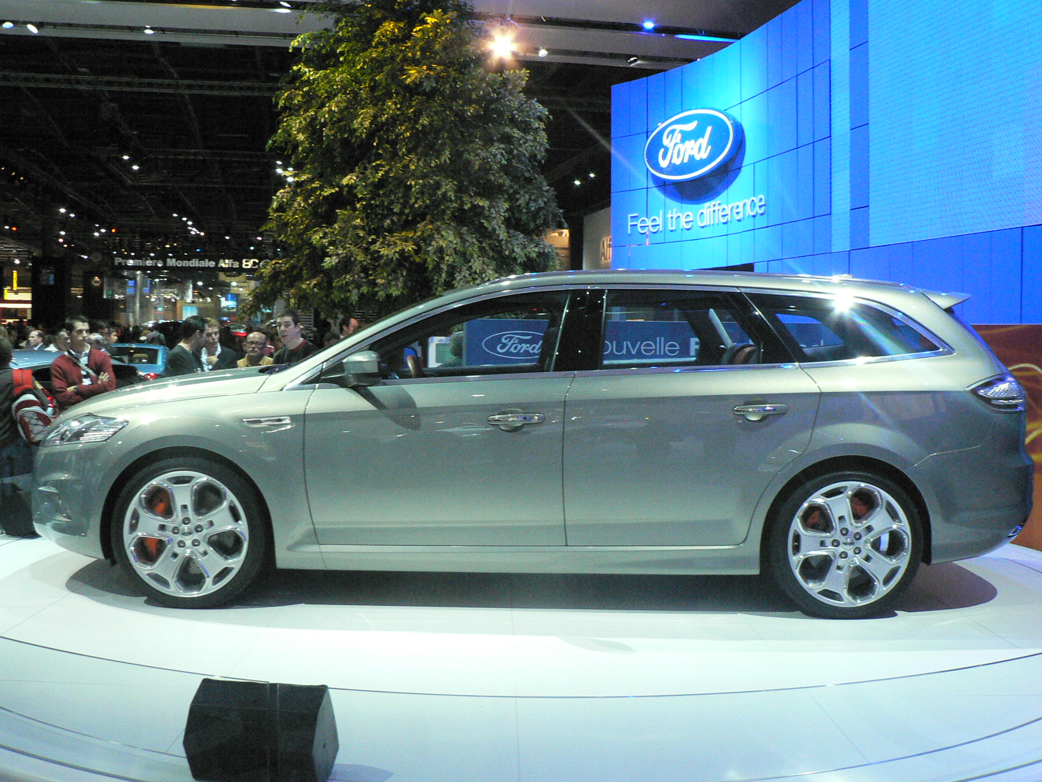 Mondial de l'automobile, Paris 2006